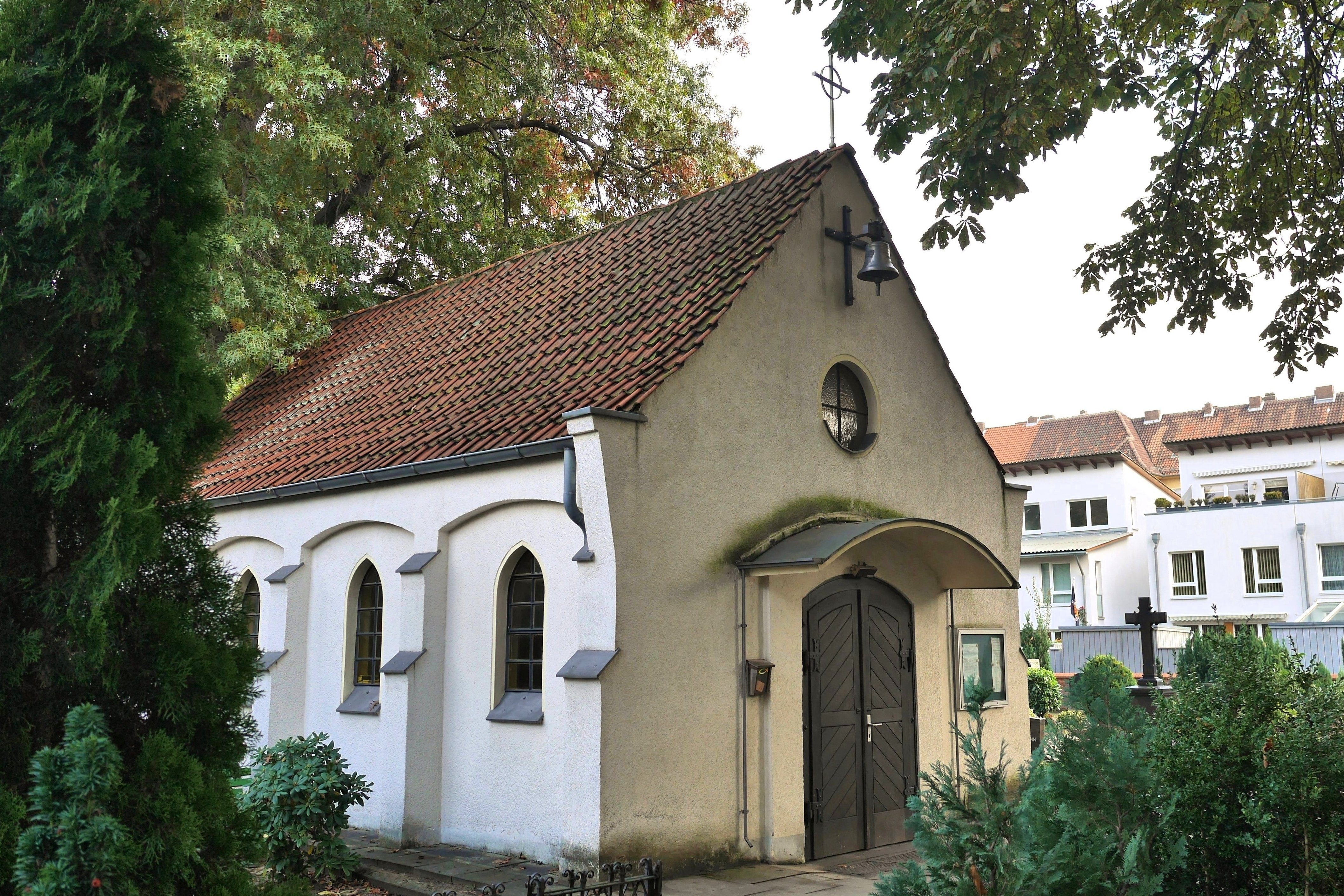 Hannover-Hainholz, Friedhofskapelle mit Glocke 52.395505, 9.723659